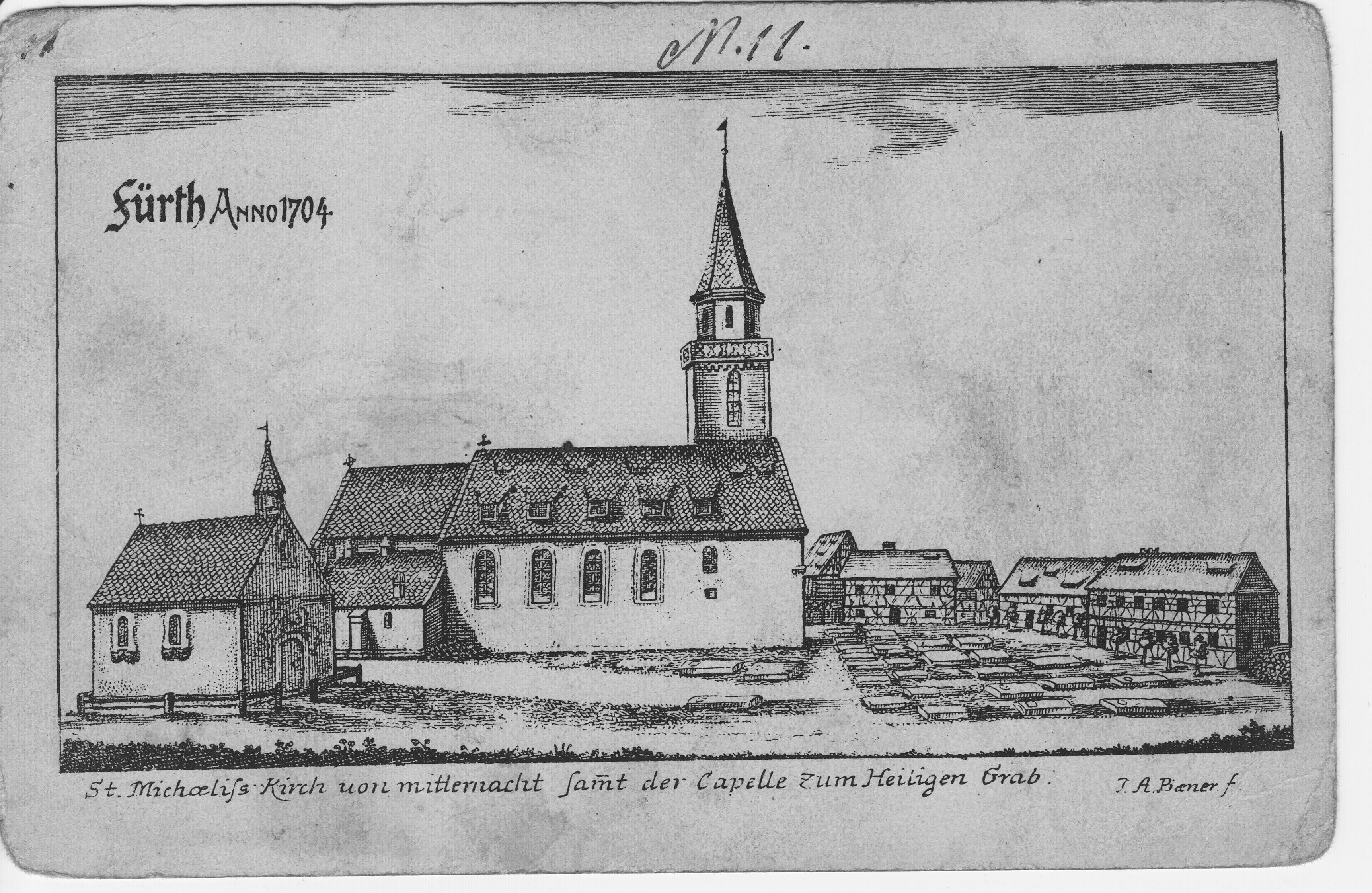 Stich von J.A. Boener aus dem Jahre 1704 auf einer Postkarte, Kirche St. Michael von Norden mit Heilig-Grab-Kapelle